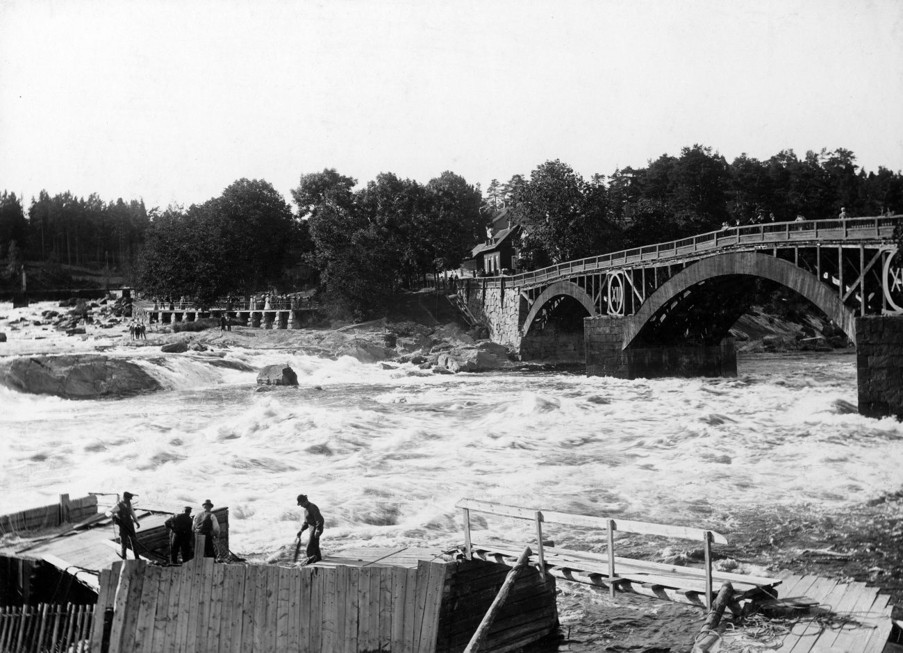 DIG30718. Carl XIII:s bro i Älvkarleby. Fotografiet är skänkt till Tekniska museet från Svenska Turistföreningen.